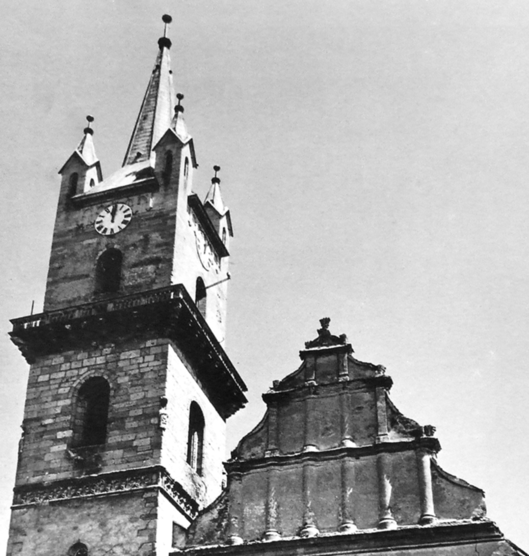 A besztercei evangélikus templom nyugati homlokzata (Szlovákia)